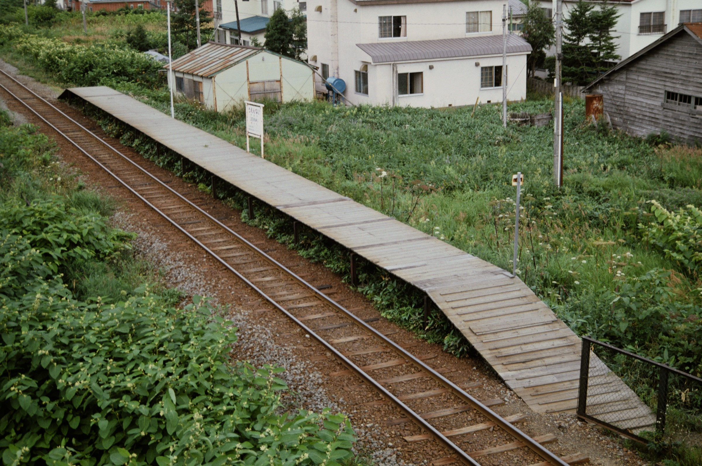 北海道旅客鉄道天北線宇遠内駅・ホーム全景